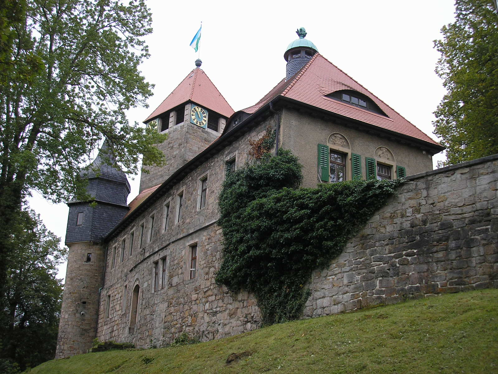 Der nördliche Teil der Elgersburg in Elgersburg (Thüringen).